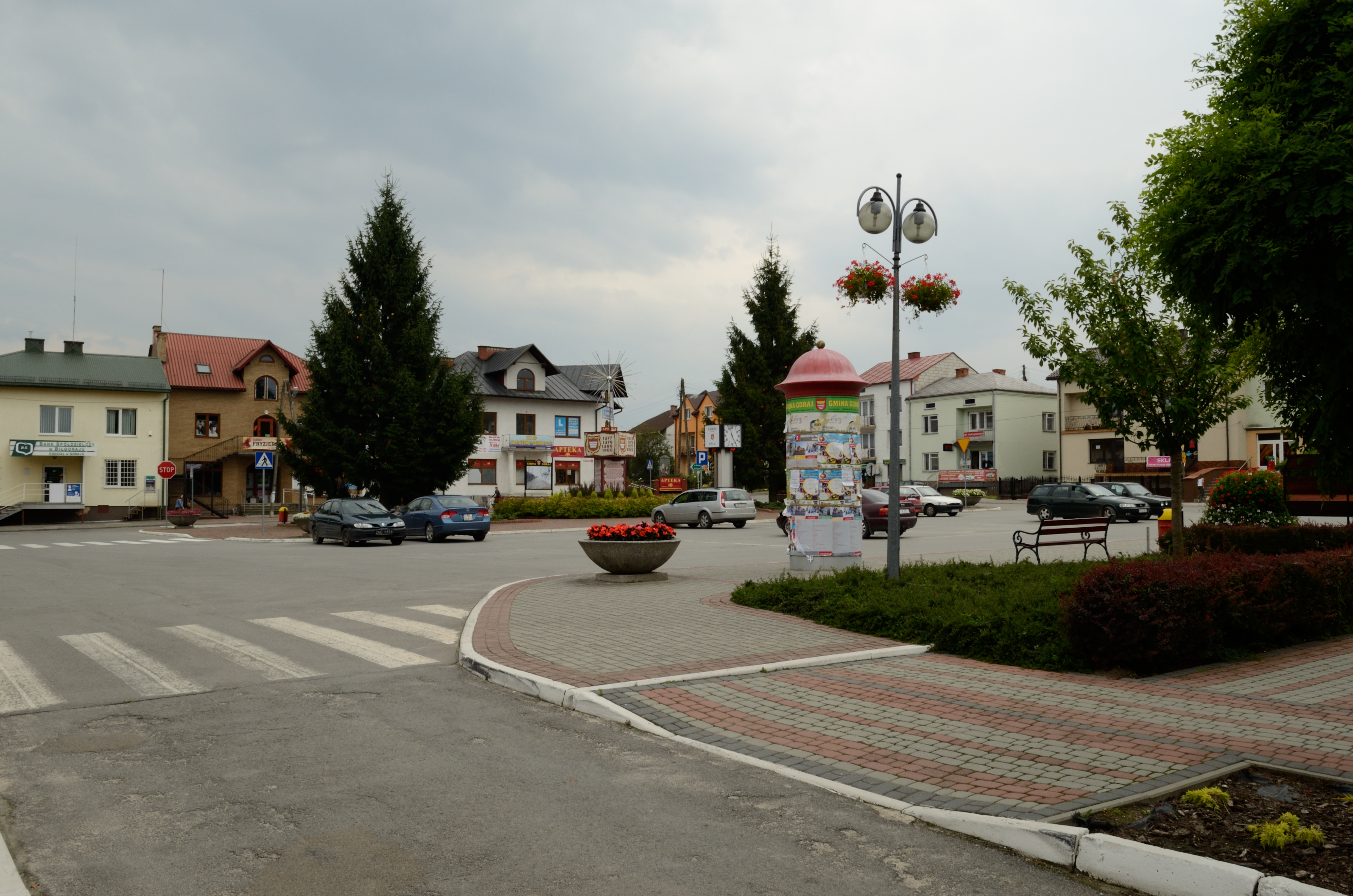 Křižovatka ve vesnici Goraj, Polsko